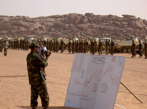 Ejército de la R.A.S.D. durante el 2005 en unas maniobras.